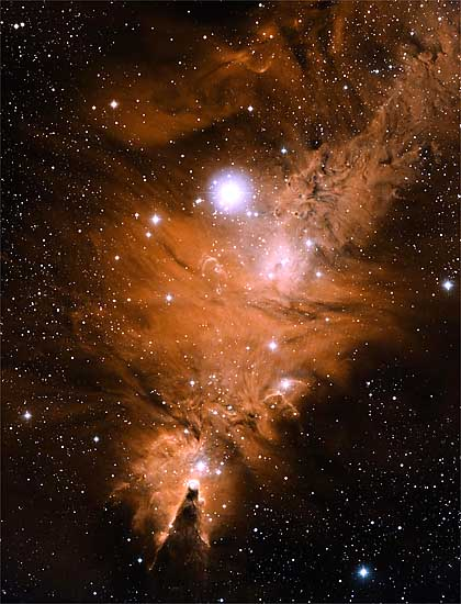 Weihnachtsbaum-cluster im Sternbild Einhorn